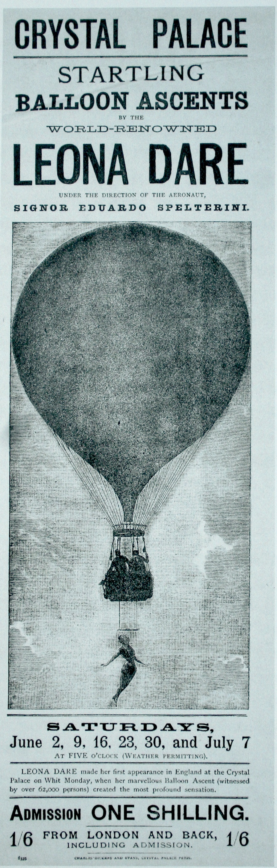 Plakat oder Handzettel für die Darbietungen der Luftakrobatin Leona Dare unter der Gondel des Gasballons "Urania" (1887, ateliers Surcouf) des Luftfahrers Eduard Spelterini im Juni und Juli 1888 am Crystal Palace in London.